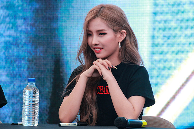 6월 2일 (여자)아이들 팬사인회